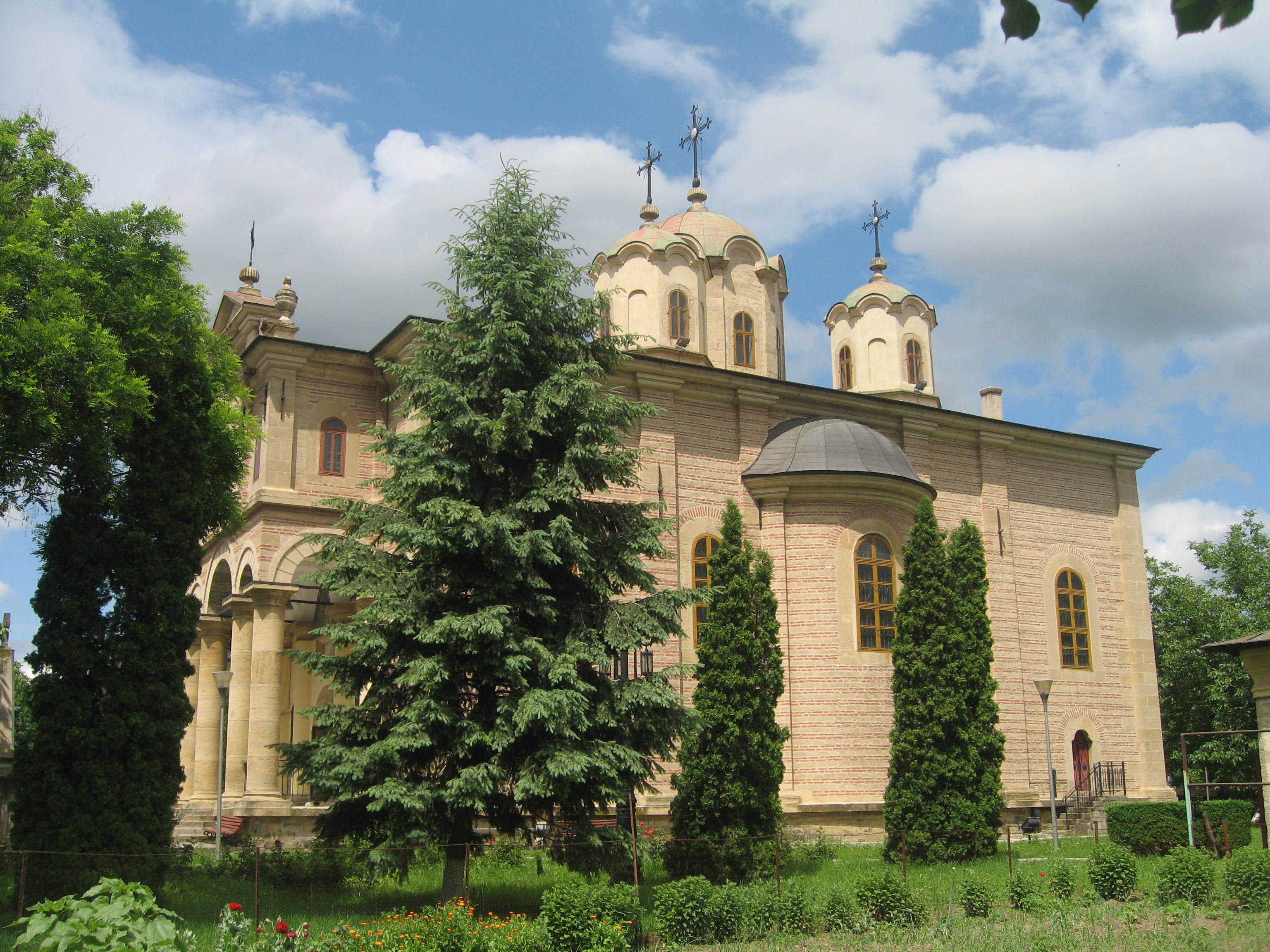 Biserica Bărboi din Iași